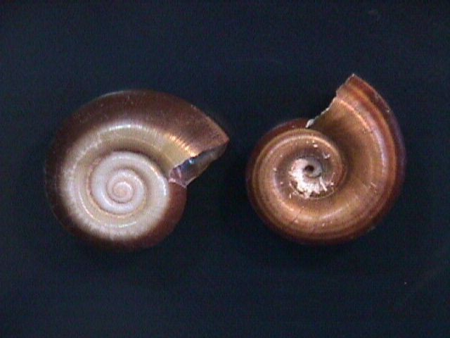 Ampullaridae, Marisa cornuarietis